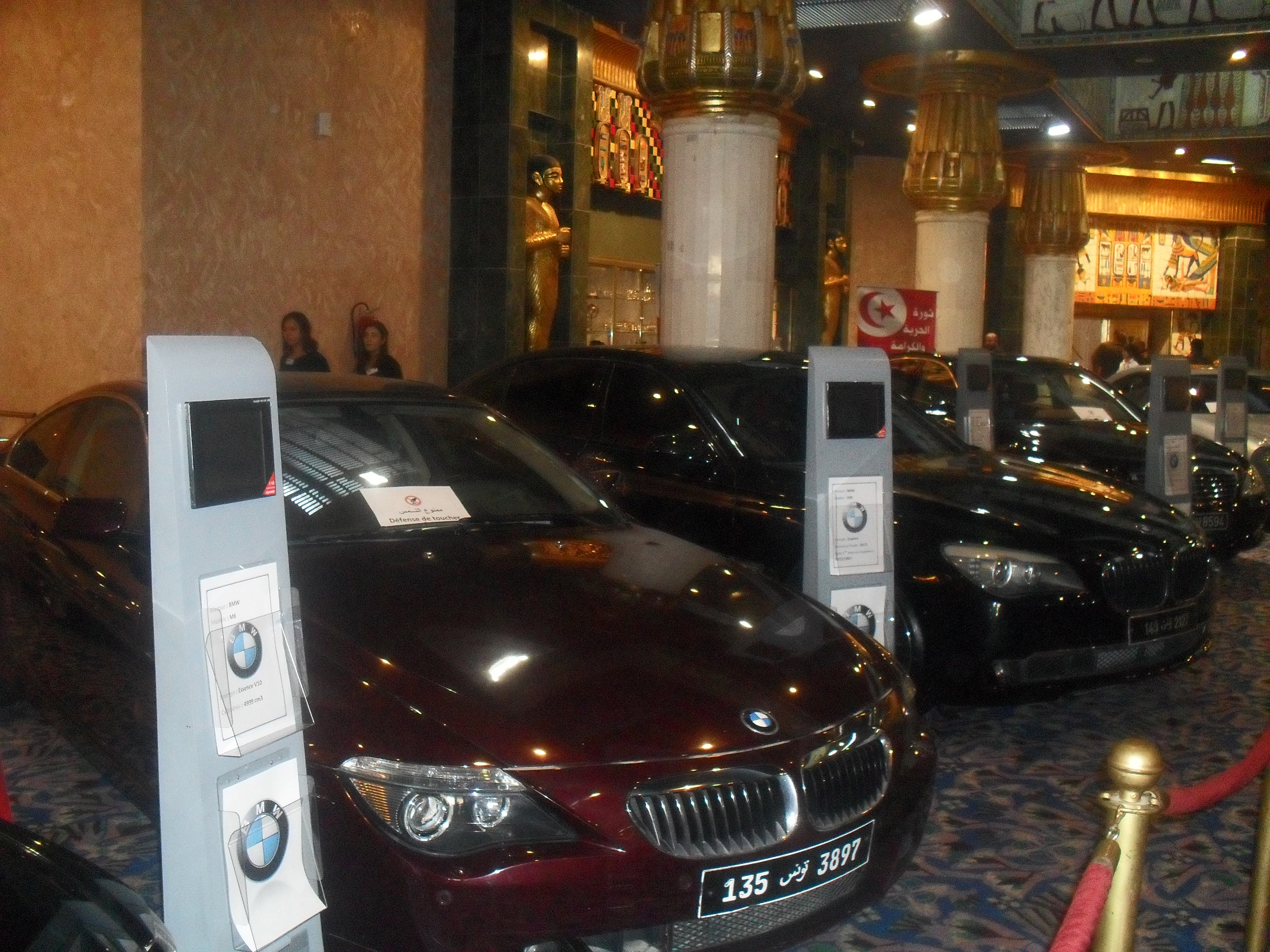 Dozens of luxury cars once owned by Ben Ali and his relatives are now up for auction. عشرات السيارات الفارهة التي كان بن علي وعائلته يمتلكونها تعرض الآن في مزاد علني. Des dizaines de voitures de luxe appartenant à Ben Ali et à ses proches sont maintenant mises aux enchères.